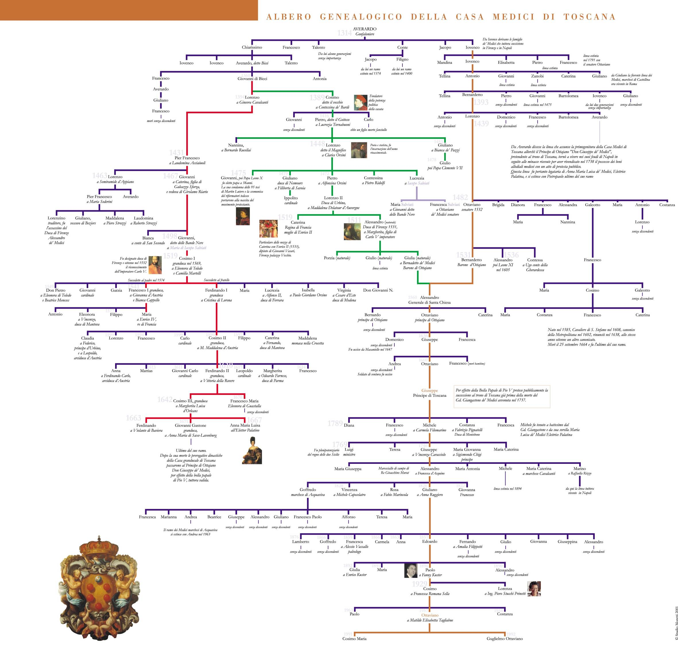 Династическое древо Оттавиано де Медичи (р. 1957)